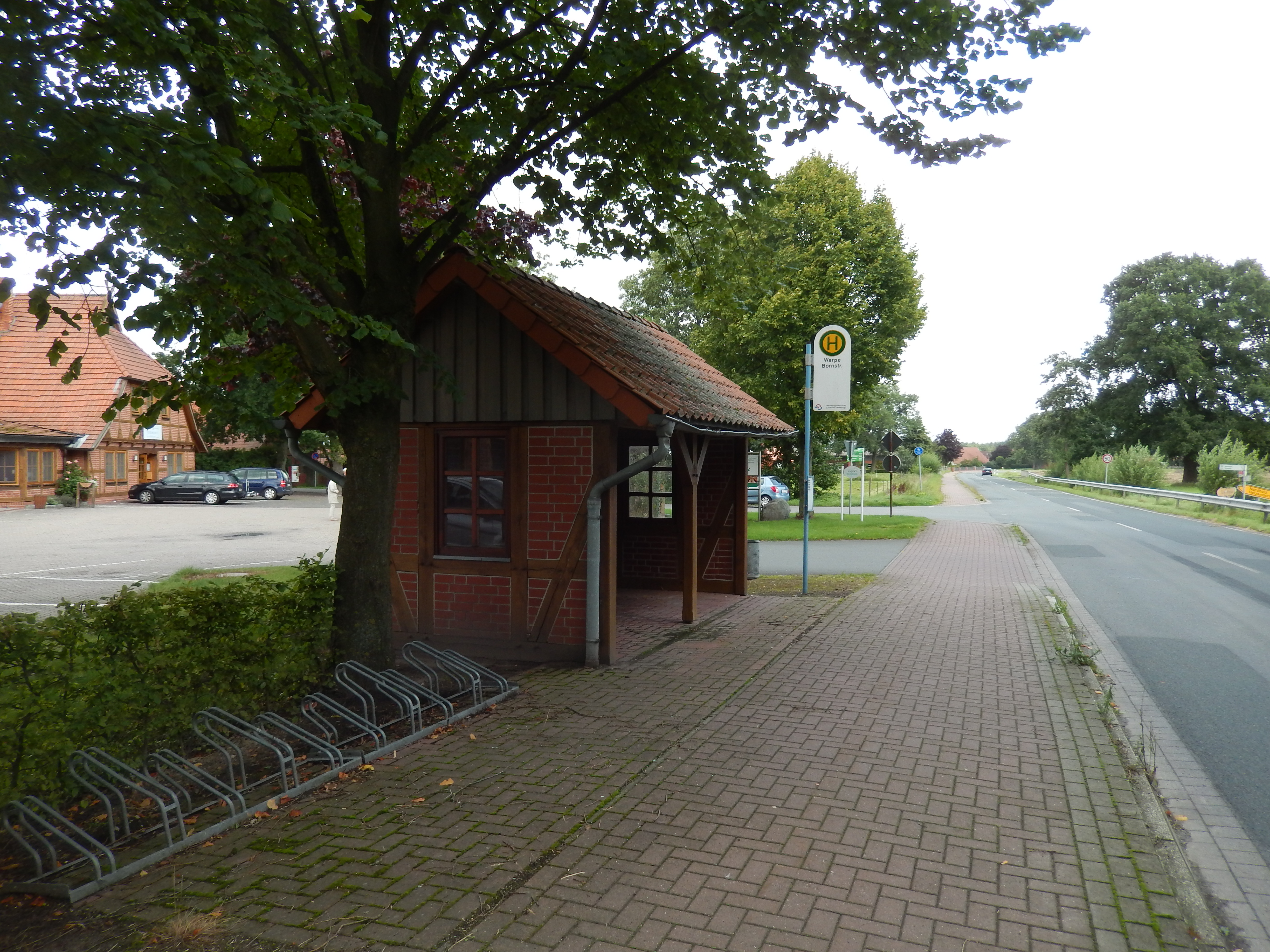 Bushaltestelle Warpe Bornstr